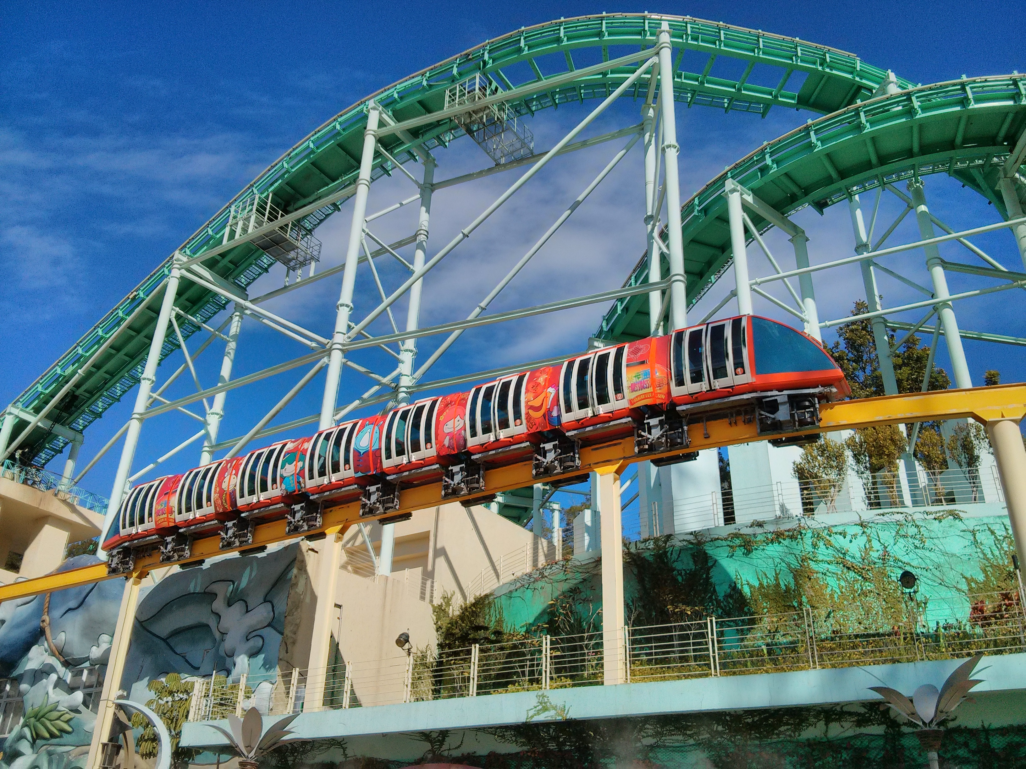 義大遊樂世界內的城堡列車（單軌鐵路）